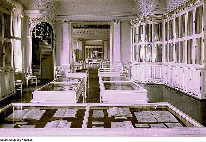 Original image description from the Deutsche Fotothek Weimar. Goethe- und Schiller-Archiv, Innenraum